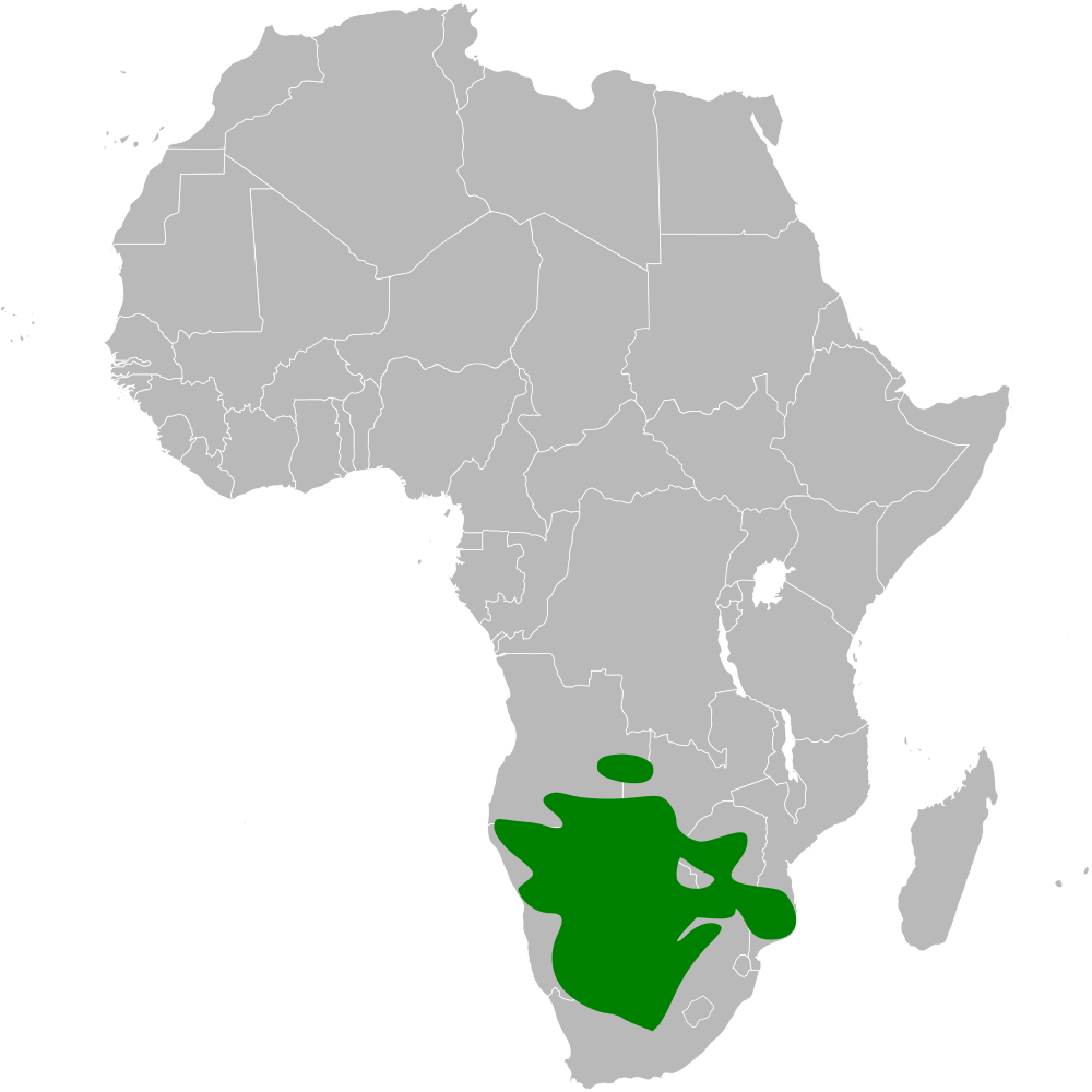 Calendulauda africanoides distribution map, based on